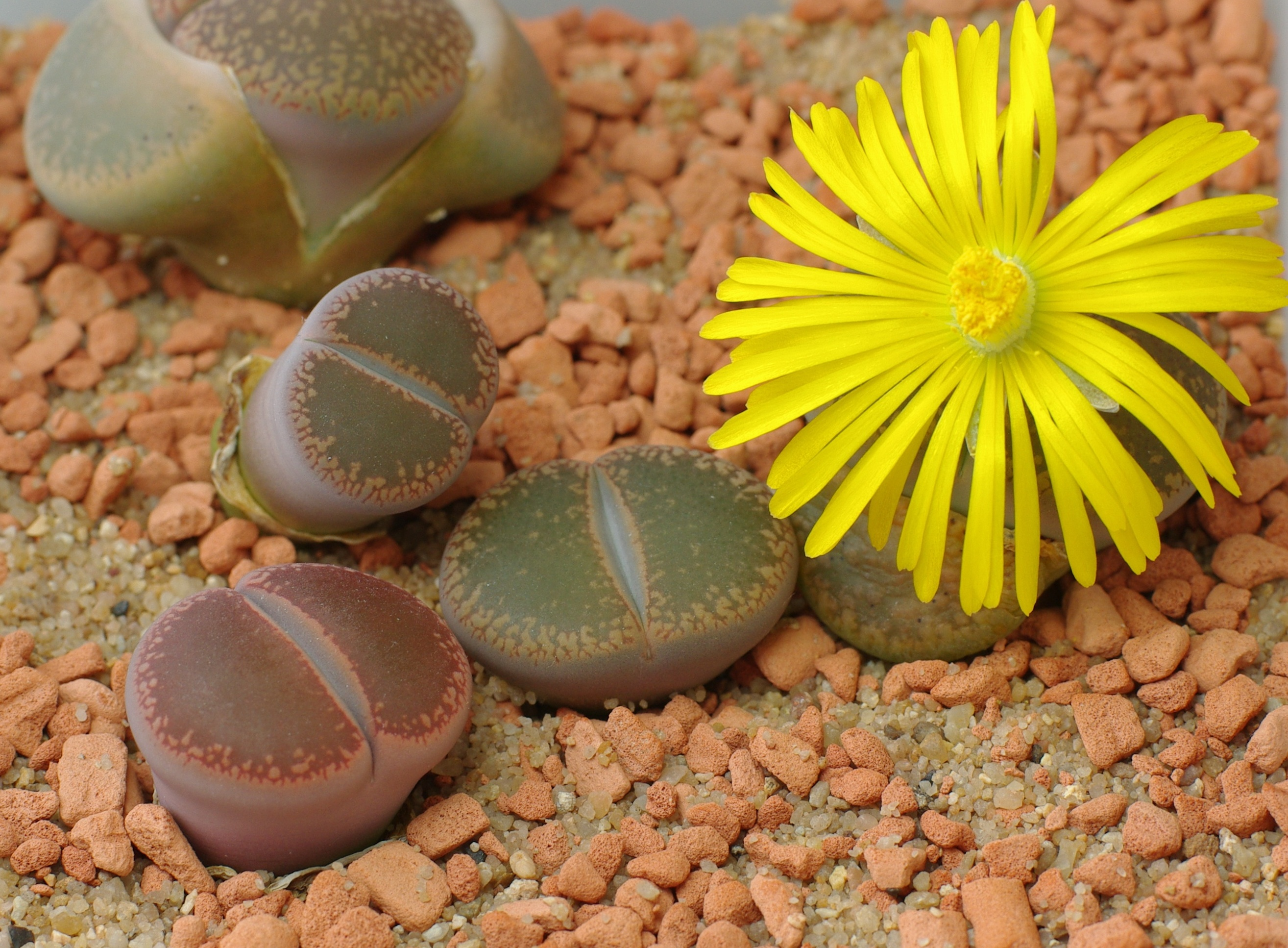 Na zdjęciu znajduje się kilka lithopsów.